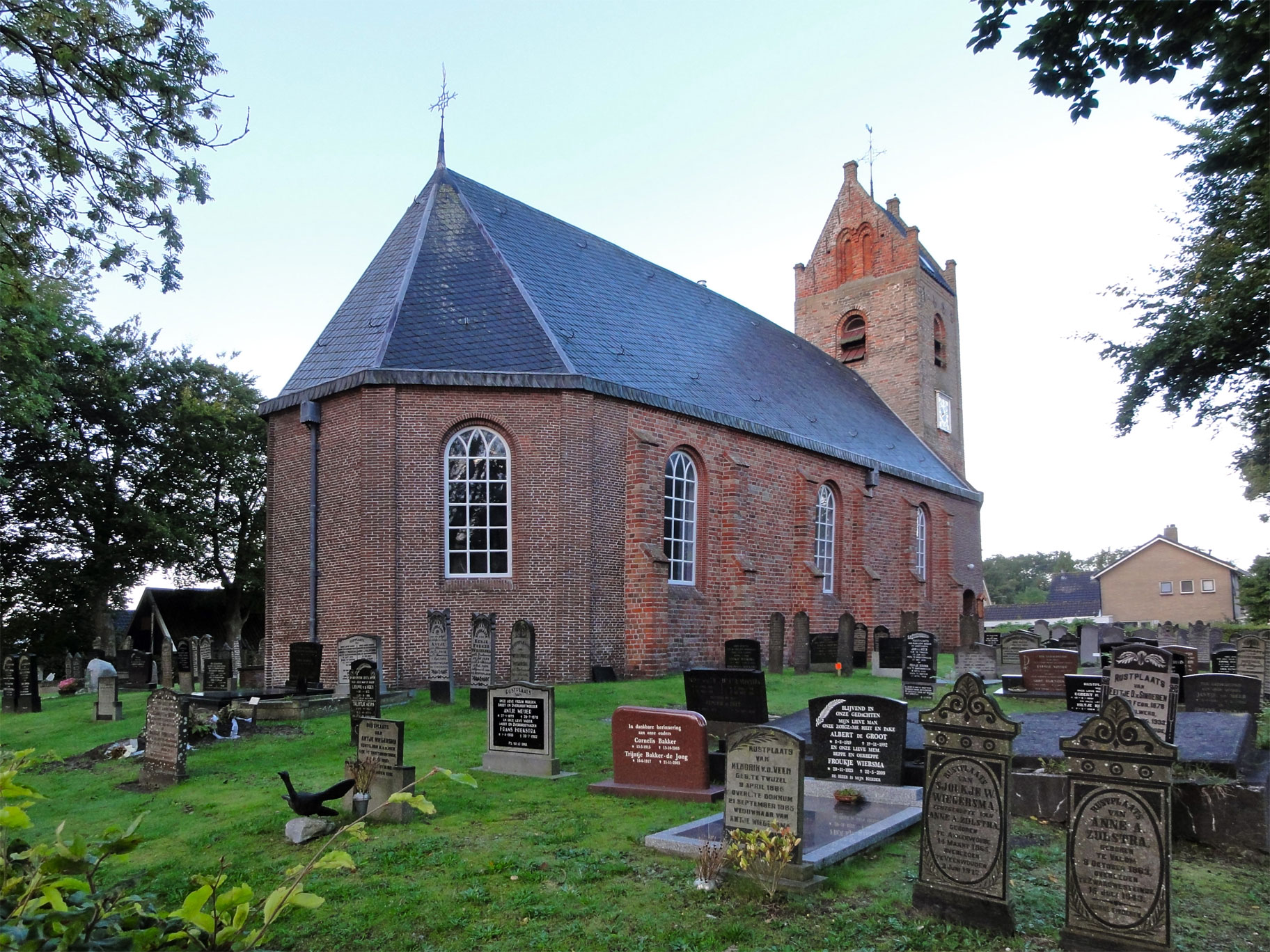 Sint Benedictuskerk Damwoude